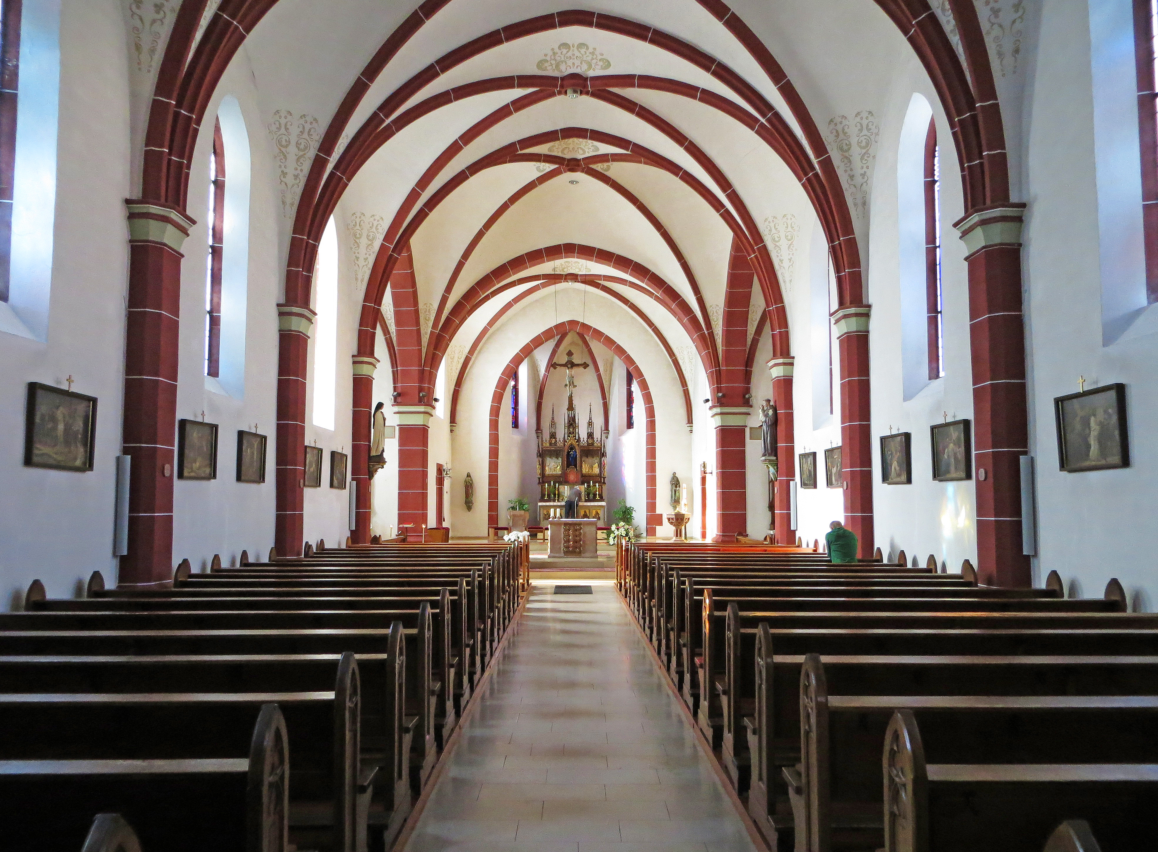 Blick ins Innere der katholischen Pfarrkirche Herz-Jesu in Münchwies, einem Stadtteil von Neunkirchen/Saar.